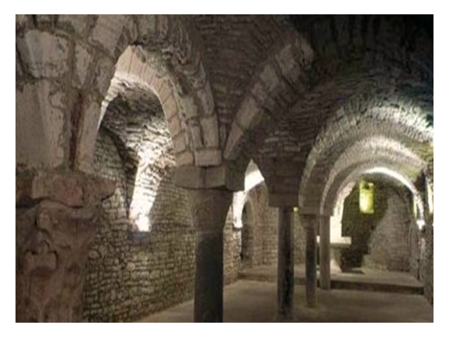 Cripta della Cattedrale di Andria o chiesa di San Pietro. Nel 44 d.C. San Pietro nel suo viaggio verso Roma qui vi celebrò una messa di conversione dei cittadini andriesi. All'interno vi sono le sepolture di due delle mogli di Federico II del Sacro Romano Impero, Jolanda di Brienne ed Isabella D'Inghilterra.